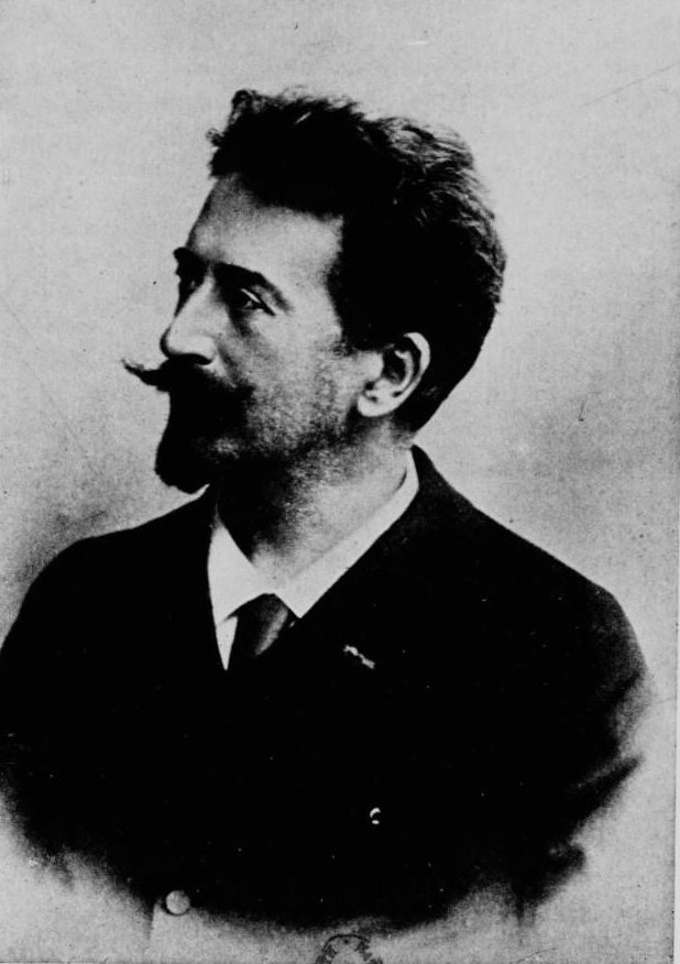 Félicien Rops